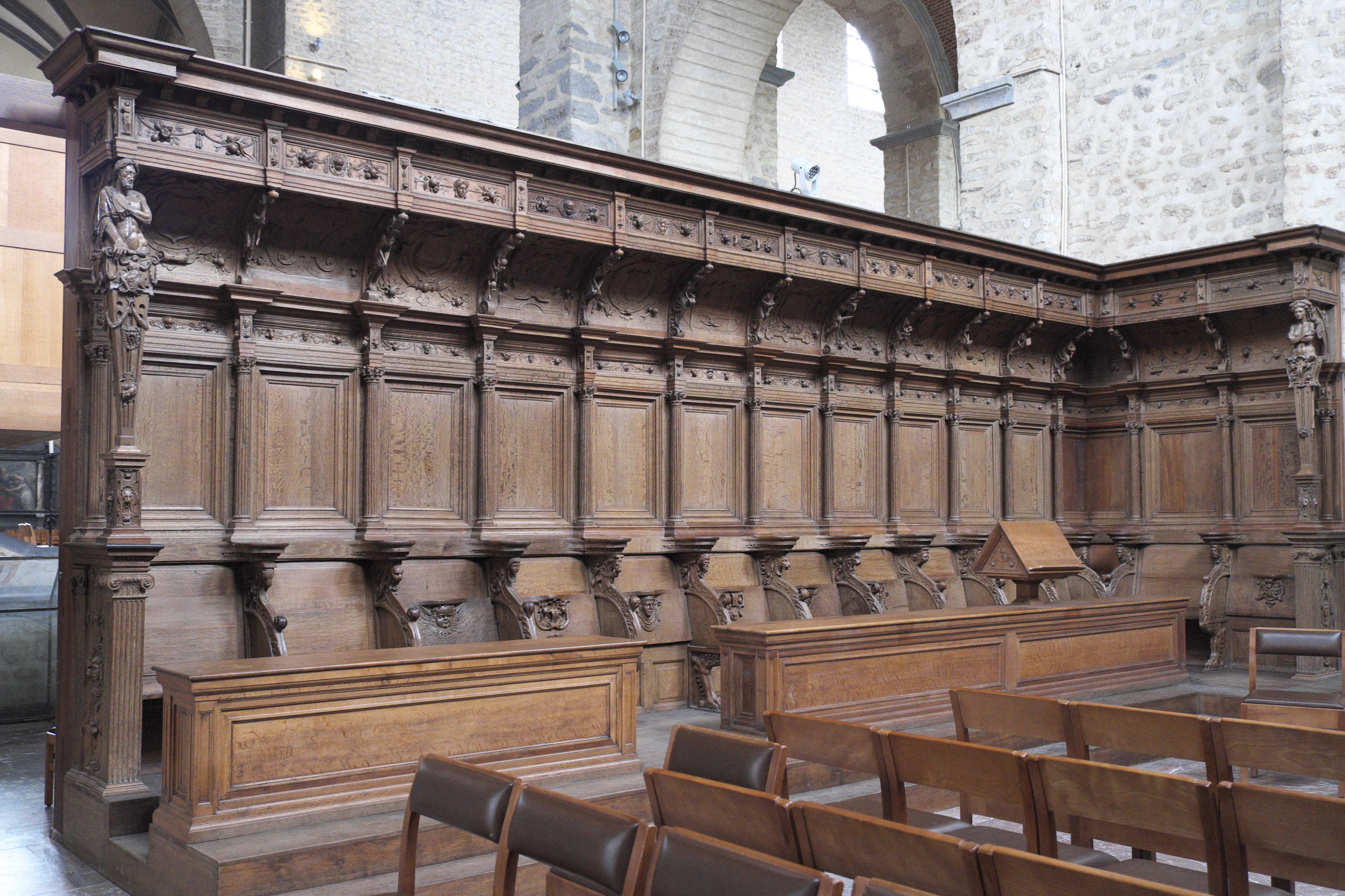 Katholische Pfarrkirche und ehemalige Stiftskirche St. Gertrud in Nivelles in der Provinz Wallonisch-Brabant (Wallonische Region/Belgien), Chorgestühl von 1566 in der Chapelle du Saint-Sacrement (Sakramentskapelle)